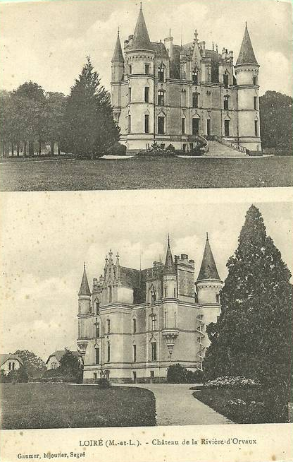 Château de la Rivière d'Orvaux à Loiré, Maine-et-Loire, France.